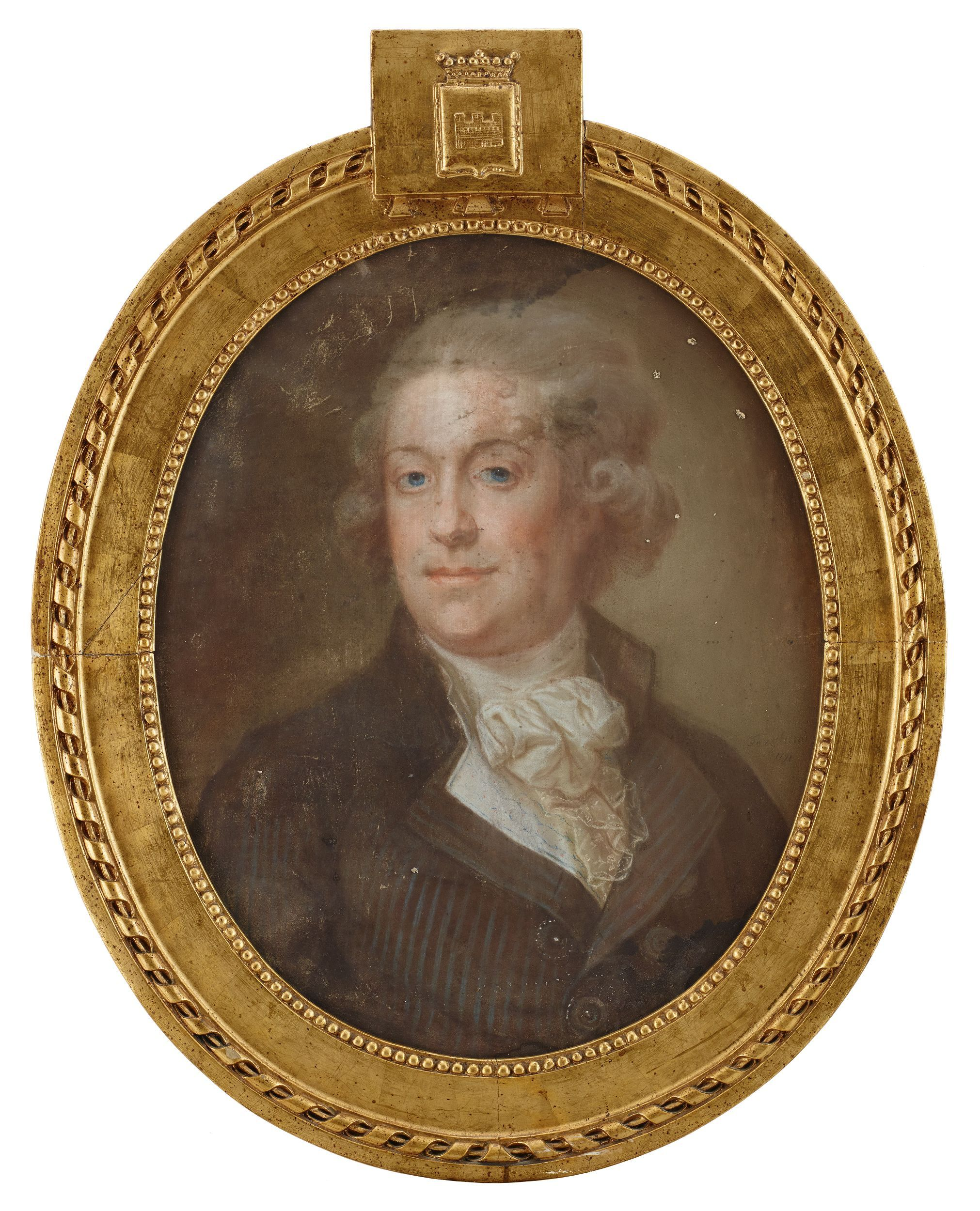 Porträtt som troligen föreställer Carl Reinhold Wrangel af Sauss (1756-1798) iklädd randig rock, väst samt halskrås. Ramen kröns av vapnet för ätten Wrangel av Sauss (nr. 279) under en friherrelig krona. Målningen är daterad 1791 och är målad av Jonas Forsslund.